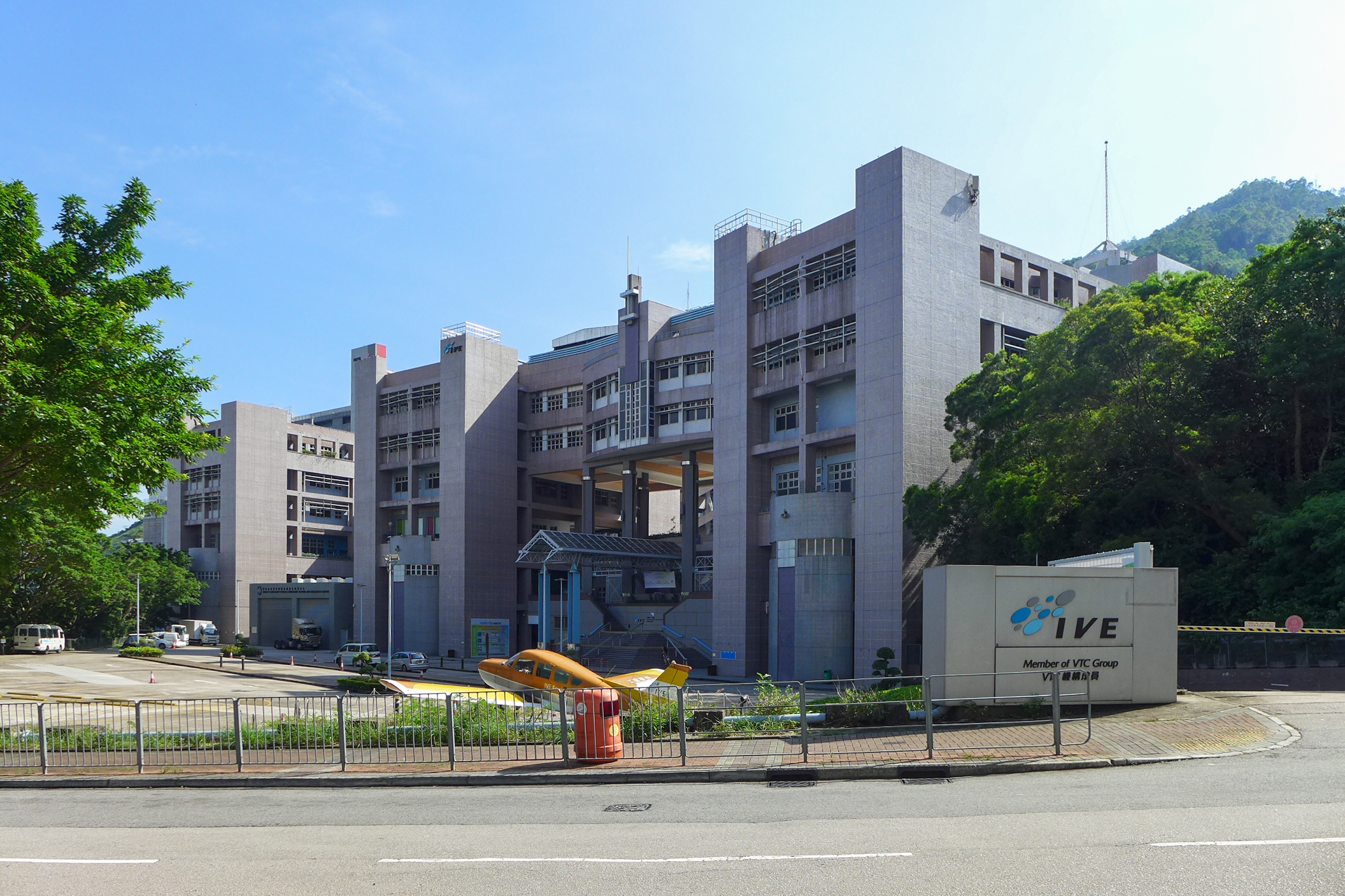 IVE Tsing Yi Campus